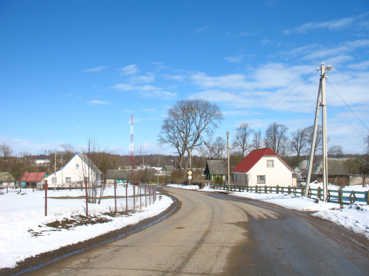 Беларуская (тарашкевіца): Камаі